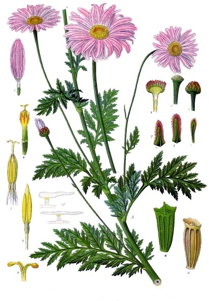 Bunte Margerite. Chrysanthemum roseum Weber & Mohr. A blühender Zweig. 1 Knospe; 2 a b c Hüllkelchblätter; 3 Blütenboden vom Hüllkelch befreit; 4 Blütenboden mit Hüllkelch, Längsschnitt; 5 Randblüte; 6 Scheibenblüte; 7 Geschlechtsorgane; 8 Ein Staubblatt; 9 Narbe; 10 Fruchtknoten; 11 Frucht; 12 Haare.